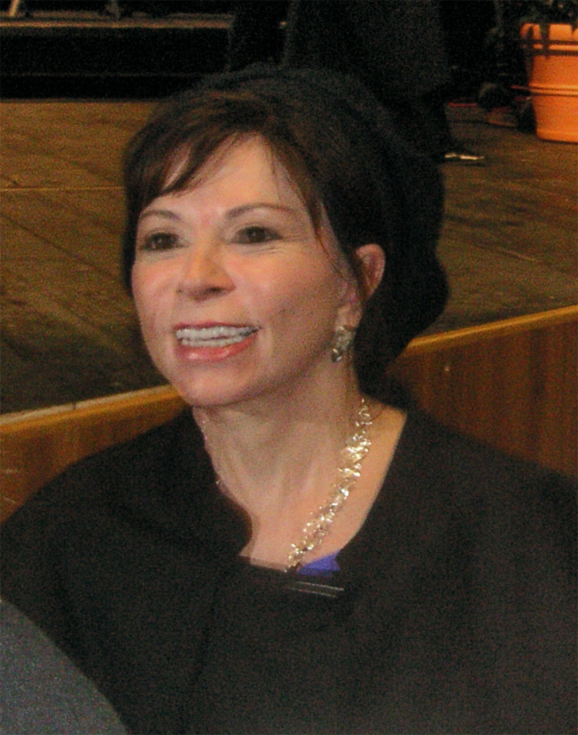 Isabel Allende a Trento per la consegna della laurea honoris causa